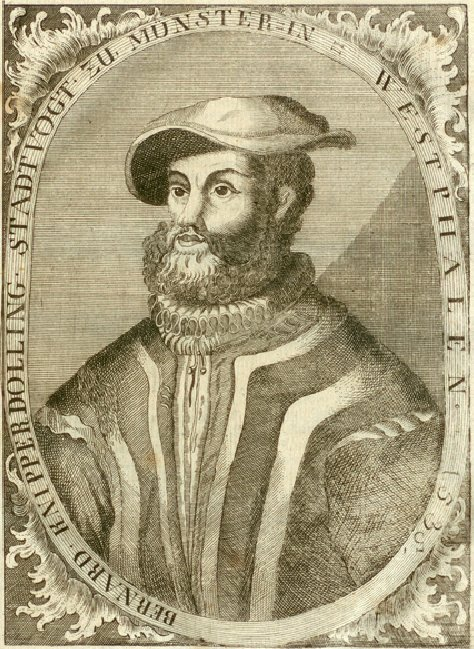 Bernd Knipperdolling